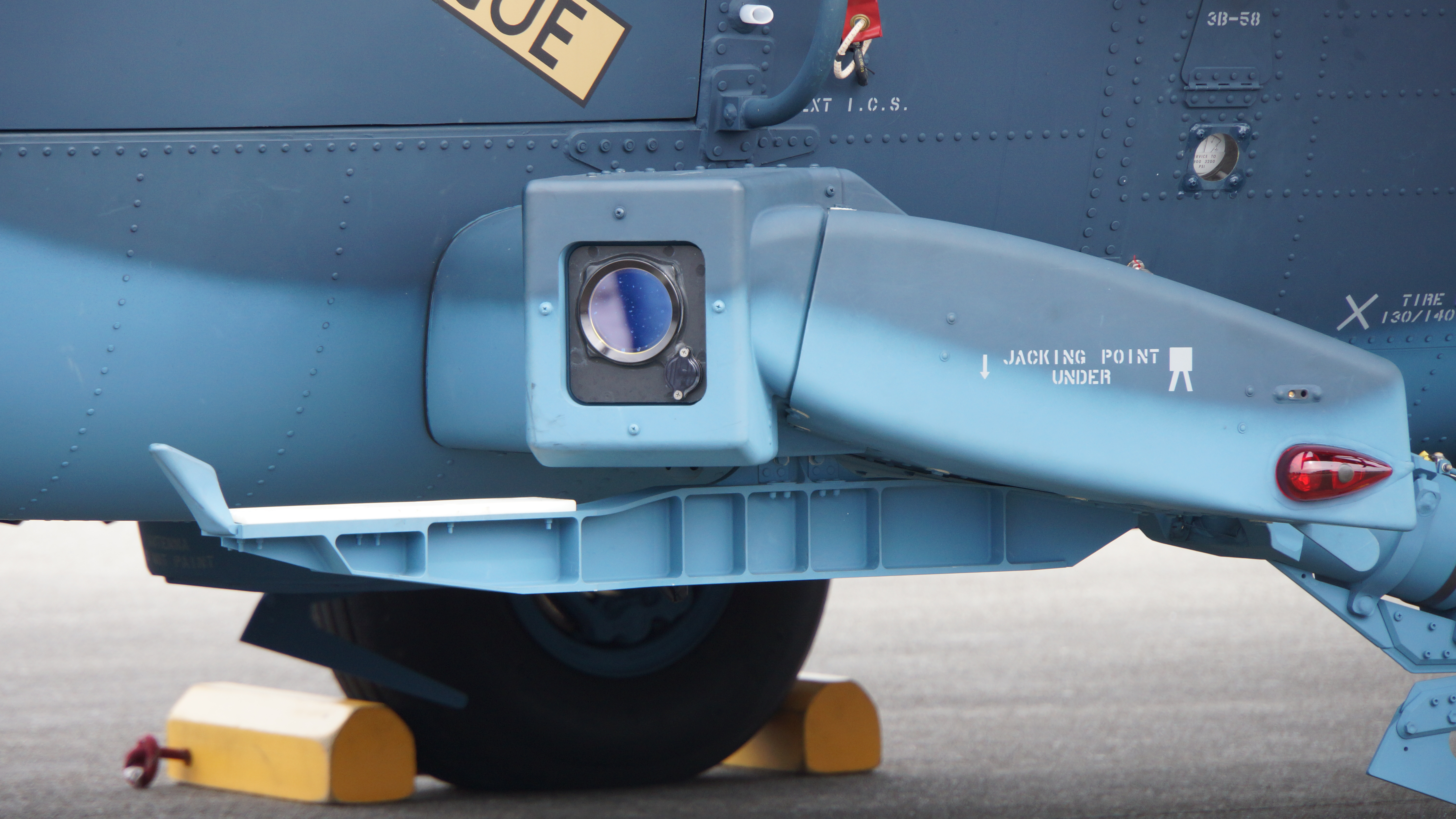 航空自衛隊 UH-60J救難ヘリコプター（58-4598号機） 左主脚部AN/AAR-60（V）ミサイル警報装置。 2016年3月13日 小牧基地にて。